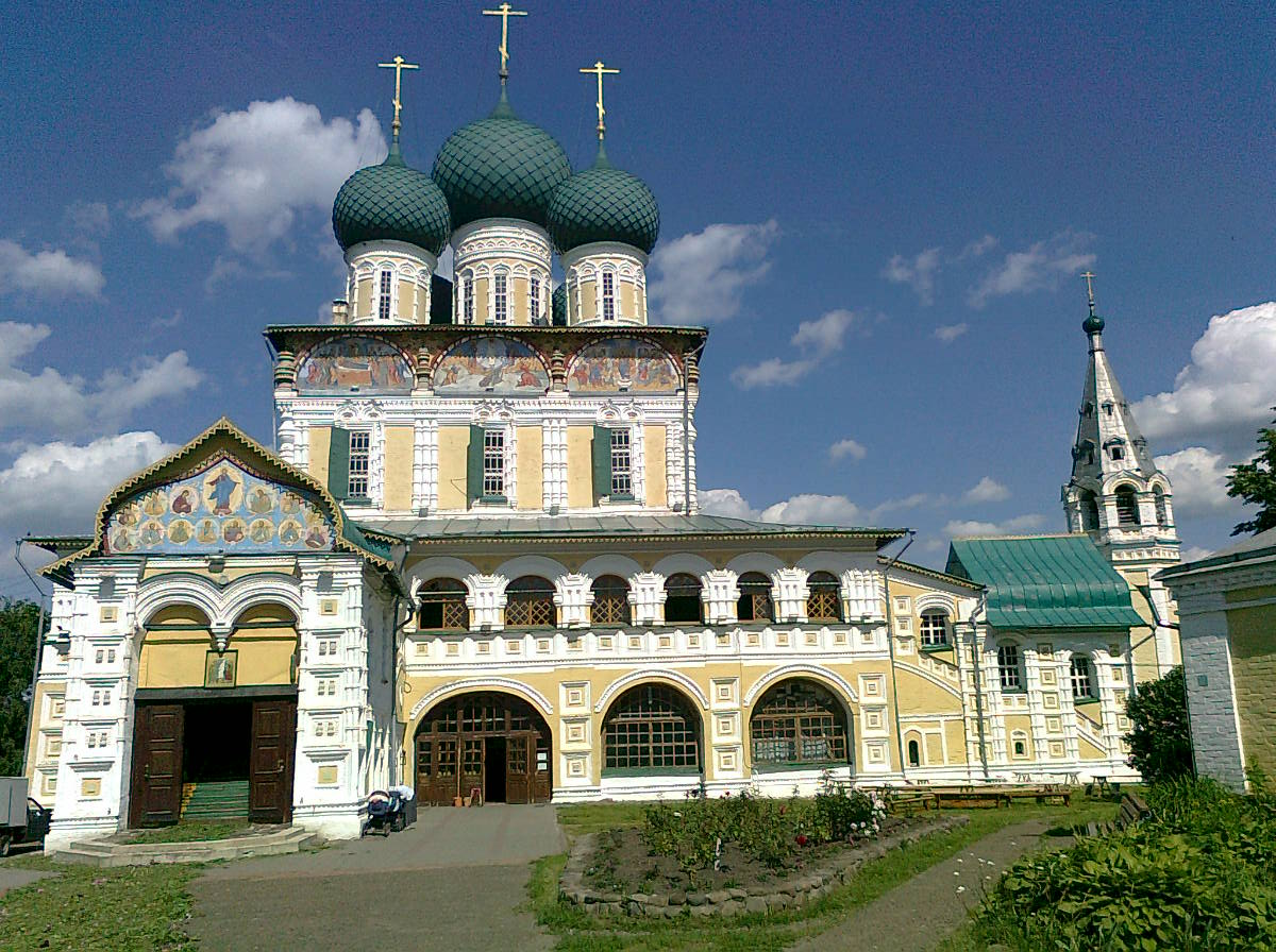 Церковь Введенская (Ярославская область, Тутаев, село Зарницыно)